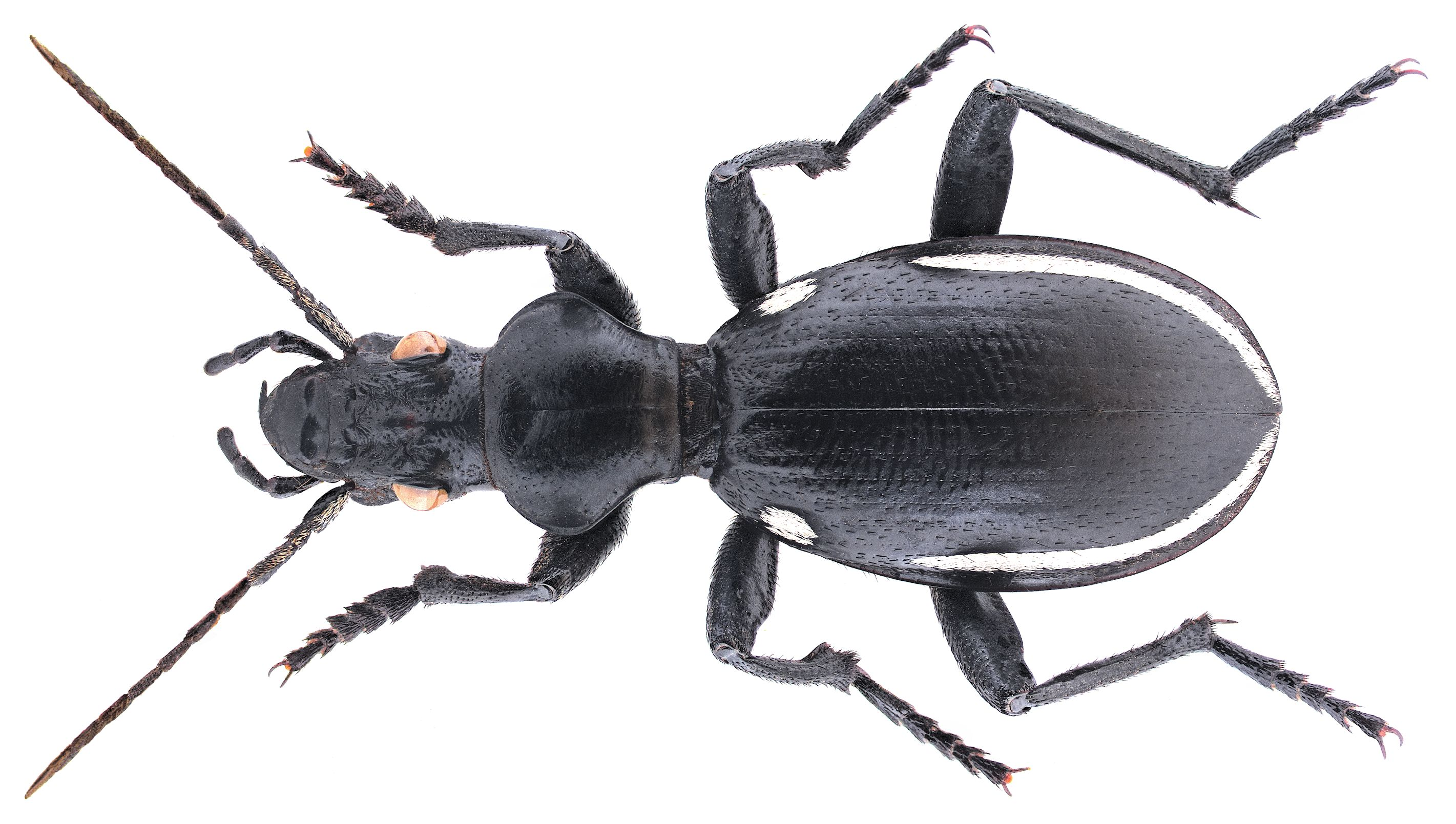 Familie: Carabidae Grösse: 35 mm Fundort: Namibia, Windhoek leg. U.Schmidt, 1994; det. W.Lorenz Foto: U.Schmidt, 2006